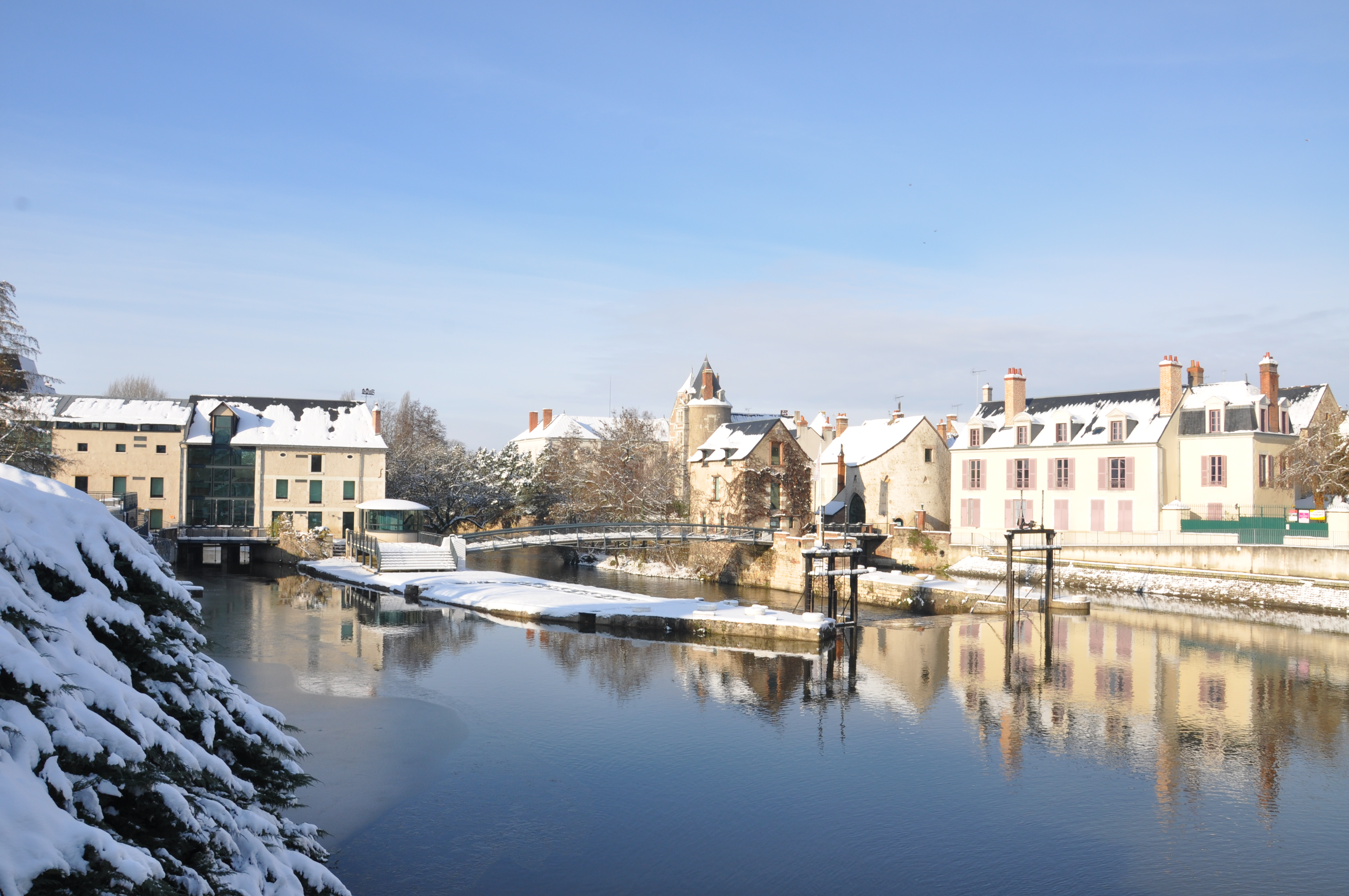 Musée de Sologne et Château de Romorantin-Lanthenay (préfecture)